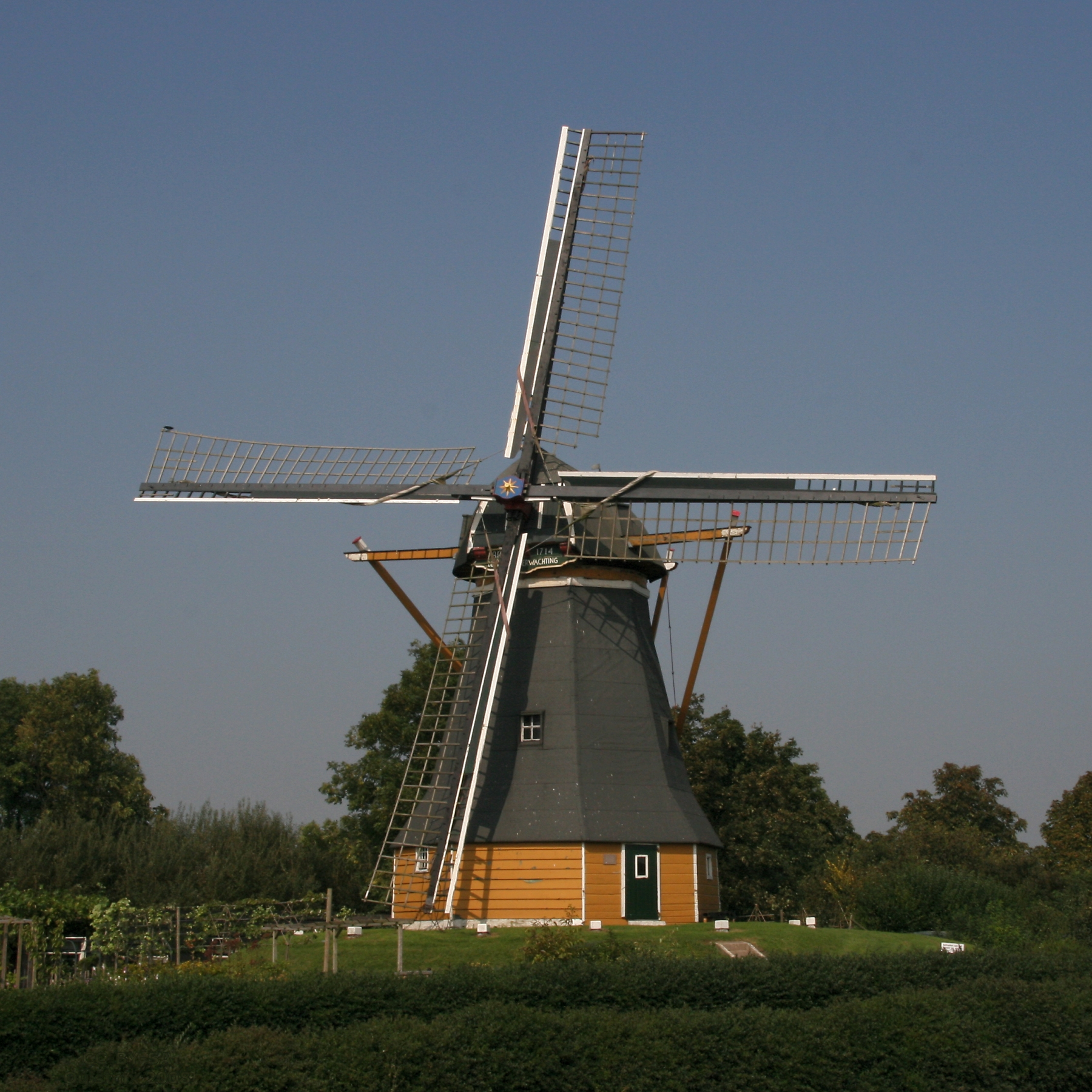 Borssele: molen De Hoop en Verwachting